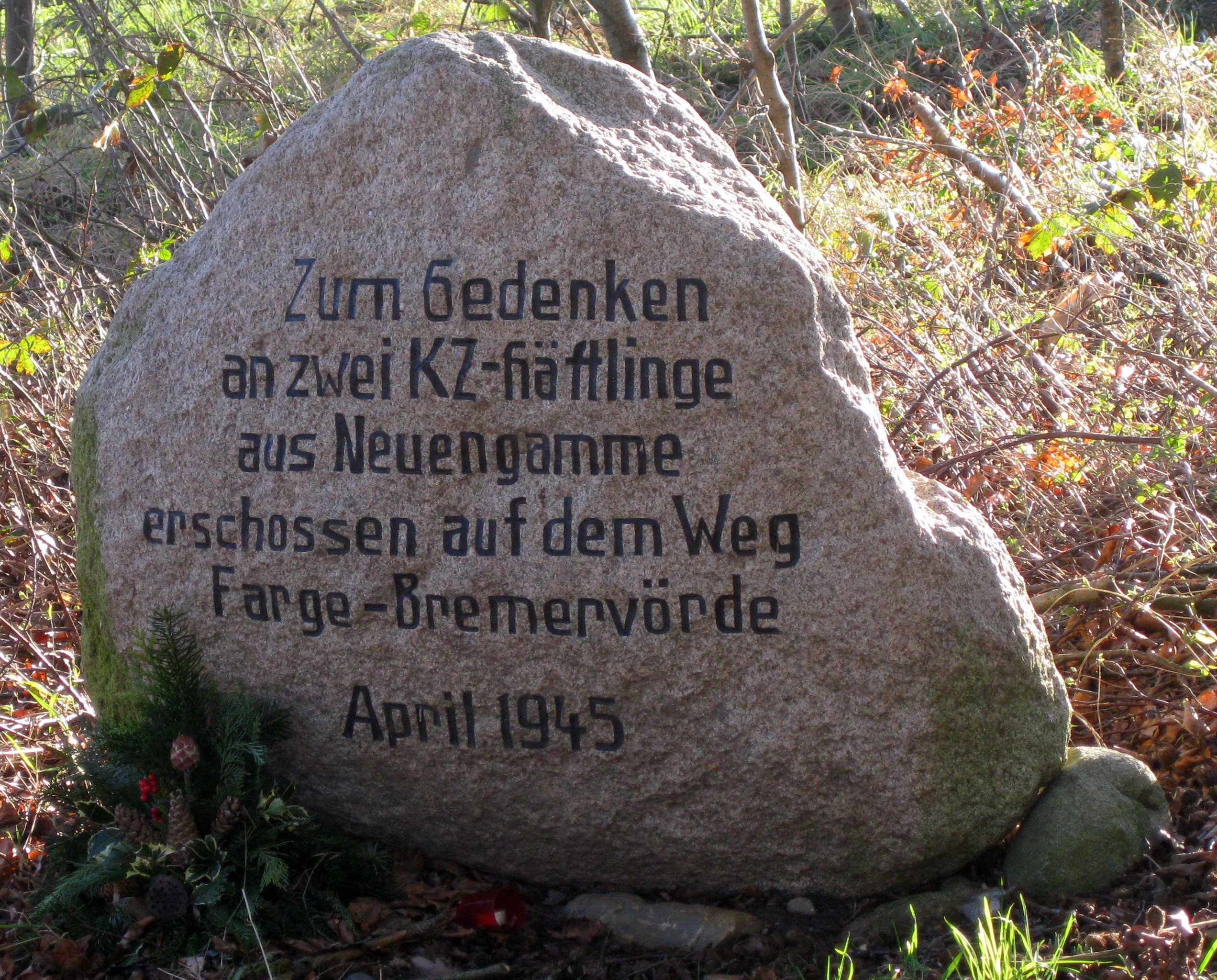 Gedenkstein an die Erschießung zweier Gefangener auf dem Marsch zwischen Bremen Farge und Sandbostel an der Bundesstraße 71 zwischen Basdahl und Volkmarst, aufgestellt von Landwirt Dücker.